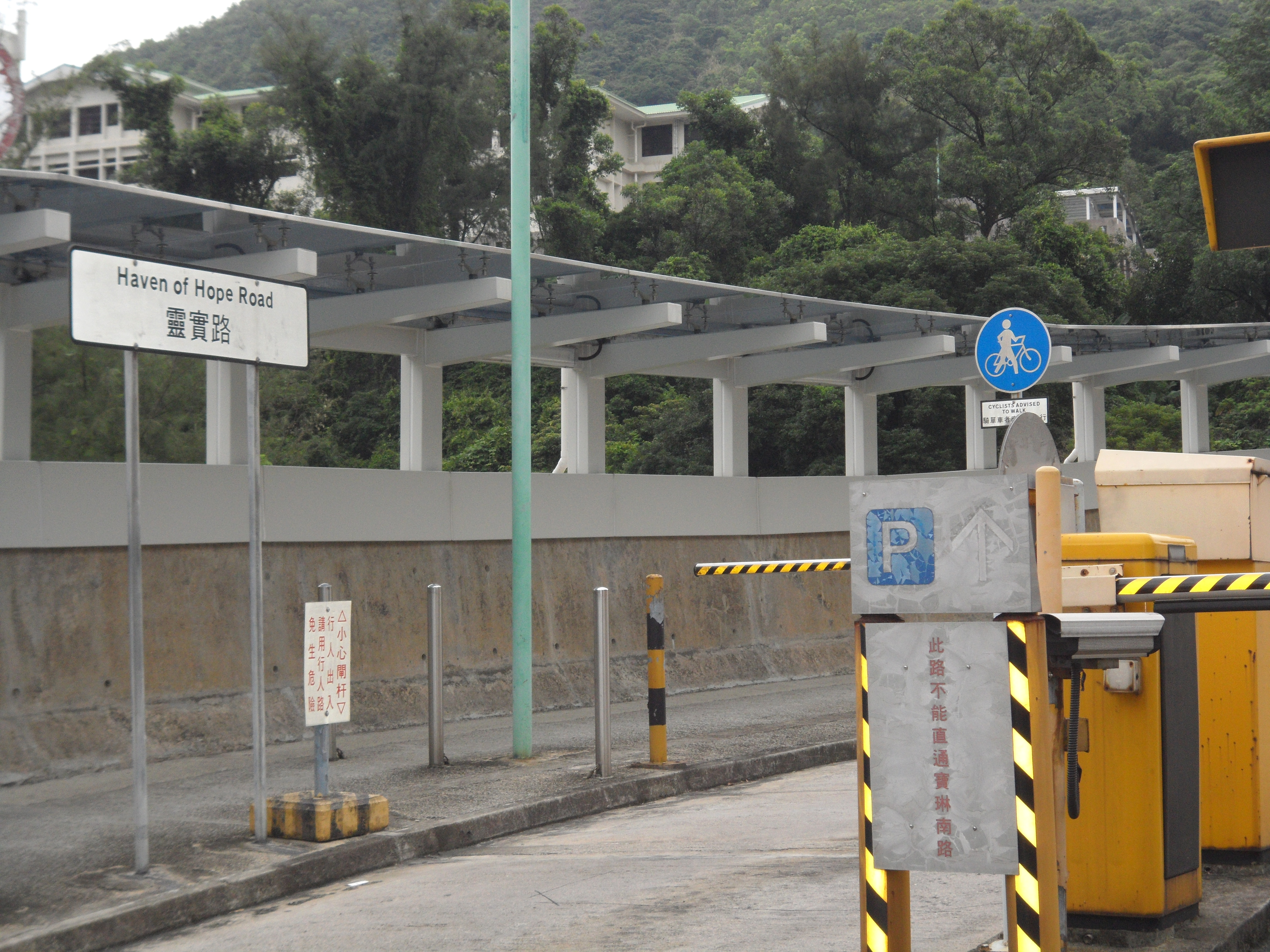 靈實路鄰近靈康路